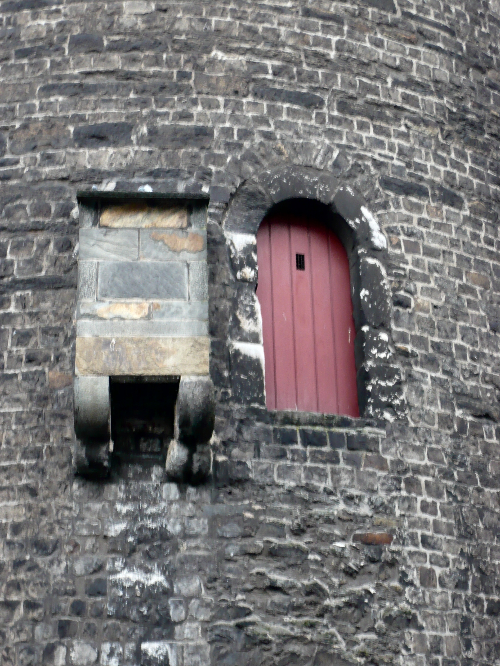 Außenliegender Abtritterker am Ostturm des Marschiertores in Aachen. Unterhalb der daneben liegenden Tür ist im Mauerwerk noch der Ansatz der geschleiften Stadtmauer zu erkennen.